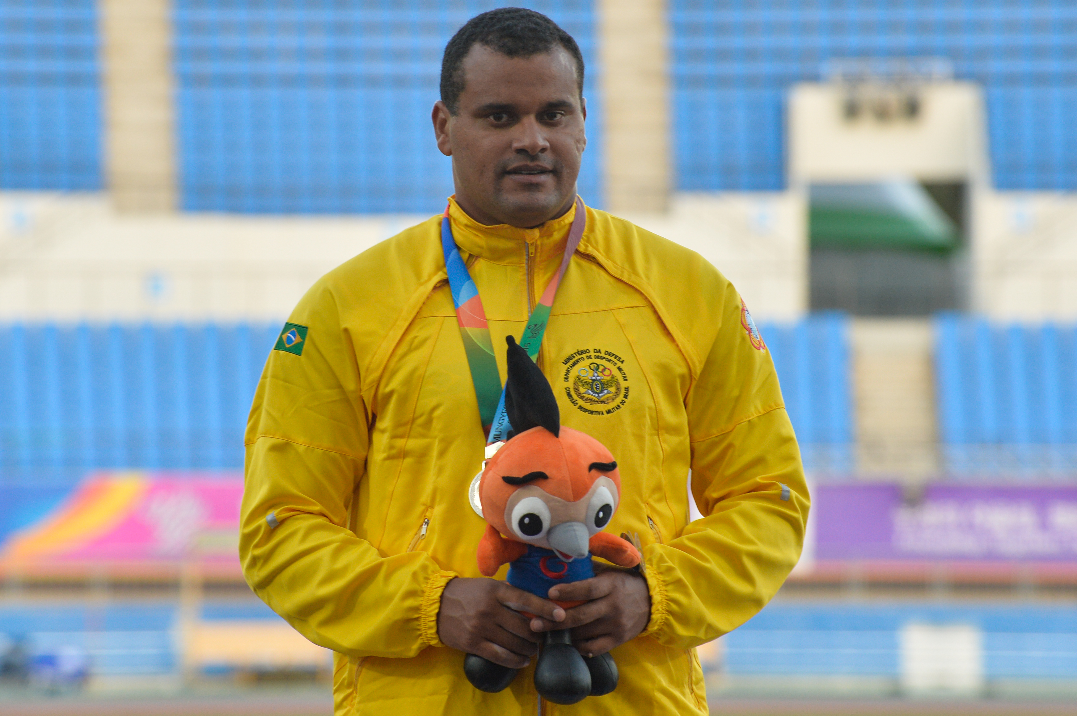 Júlio Cesar Miranda de Oliveira lança dardo e é medalha de Prata no JMM 2015.